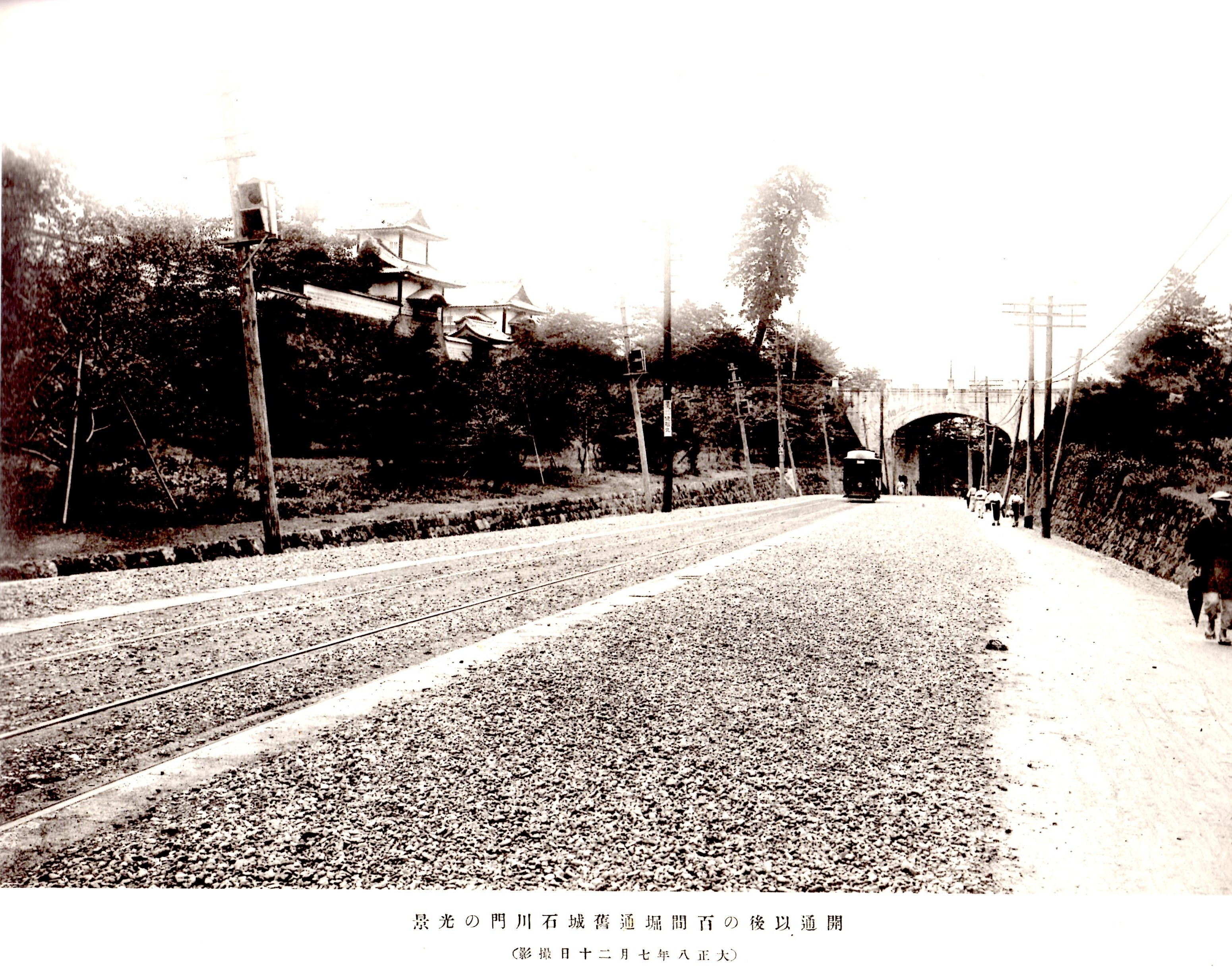 原題は「開通以後の百間堀通旧城石川門の光景」